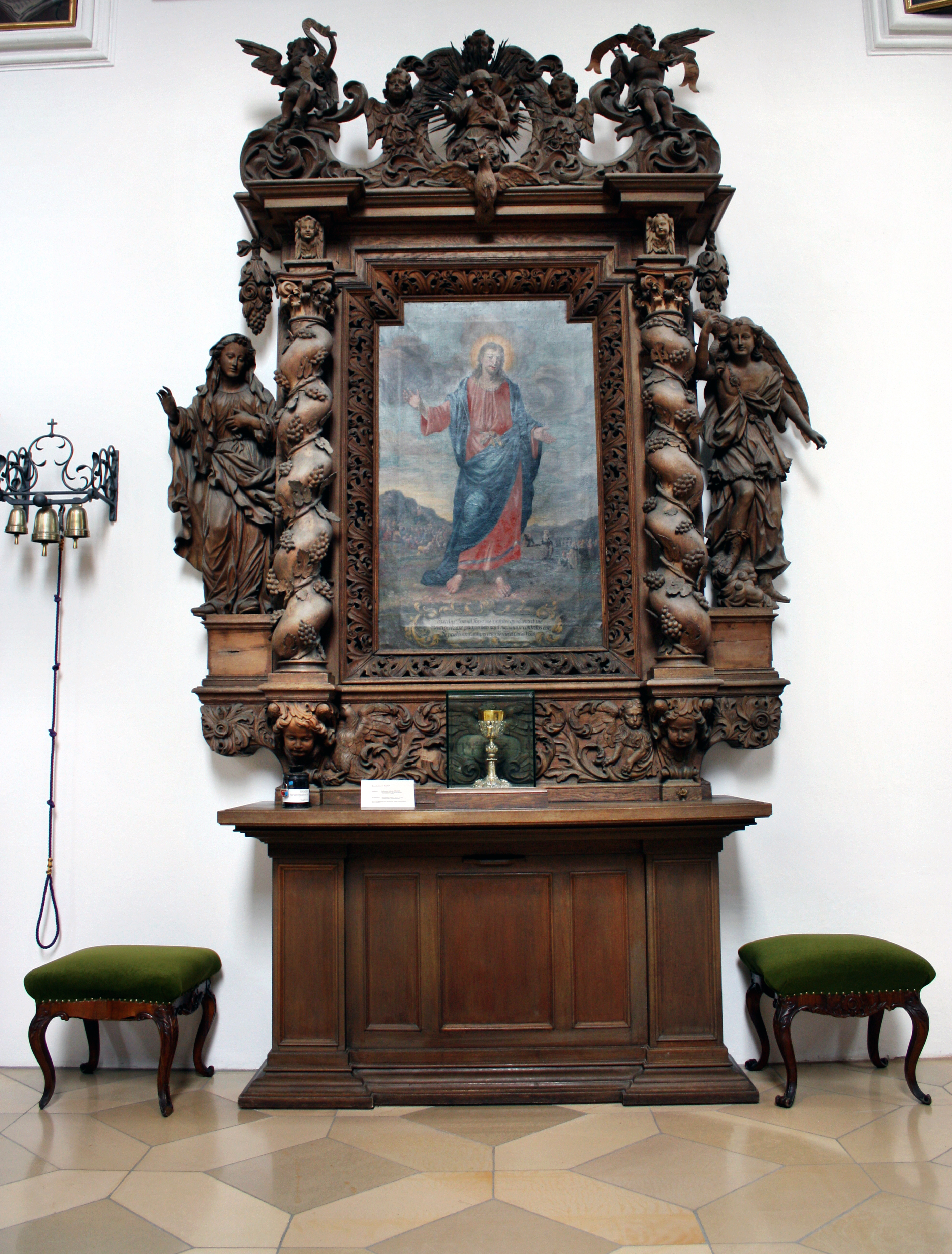 Ehemaliges Klosterkirche der Kartause in Buxheim bei Memmingen: Kredenz im Priesterchor